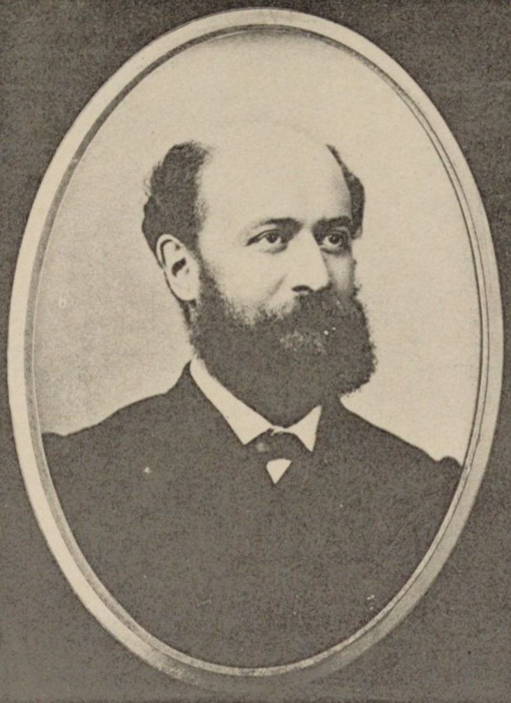 "Edmond Berlet, avocat, sénateur de Meurthe-et-Moselle, ancien sous-secrétaire d’État (1837-1886)".